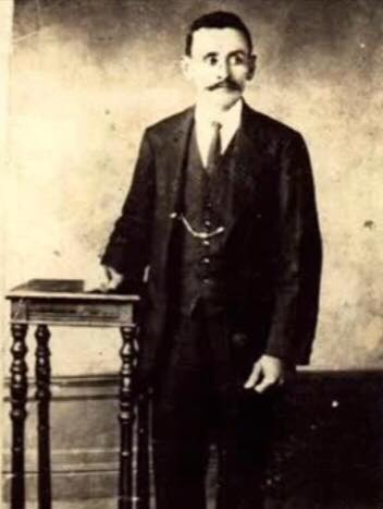 Foto: José Fernandes Ribeiro (Juca Fernandes), fundador da cidade de Itaobim.